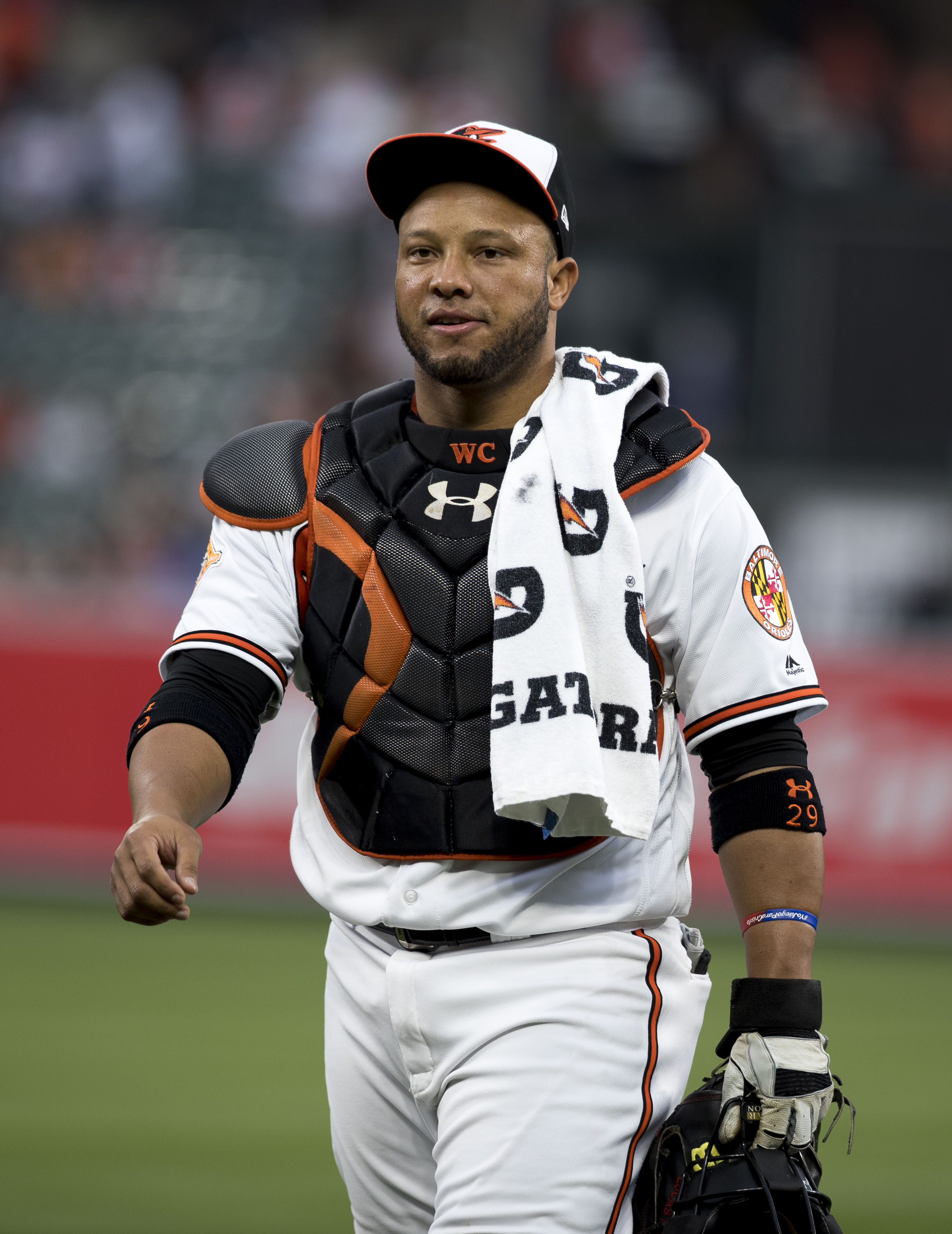 Blue Jays at Orioles 4/5/17